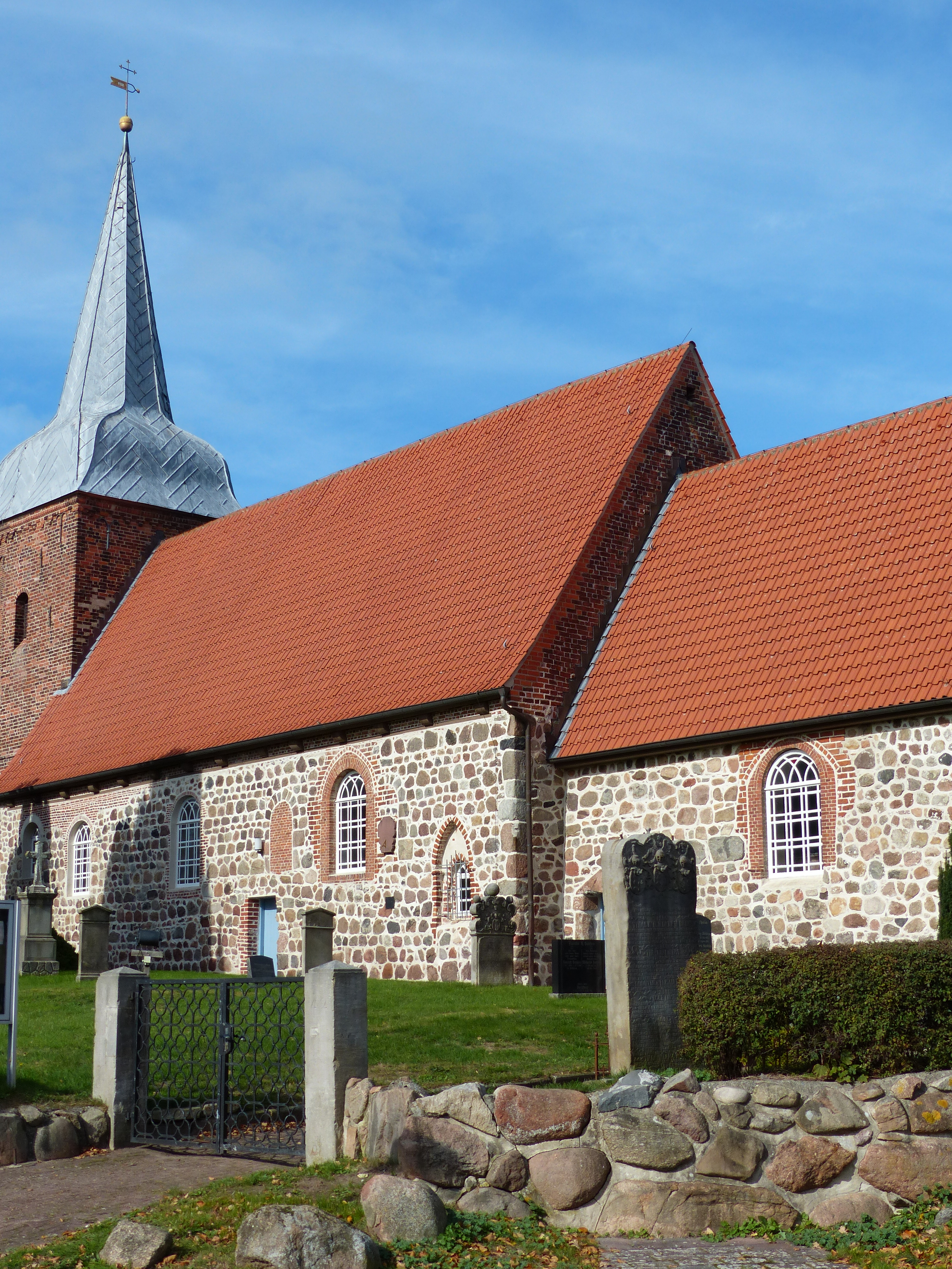 Pankratiuskirche in Midlum (Land Wursten) von Südosten